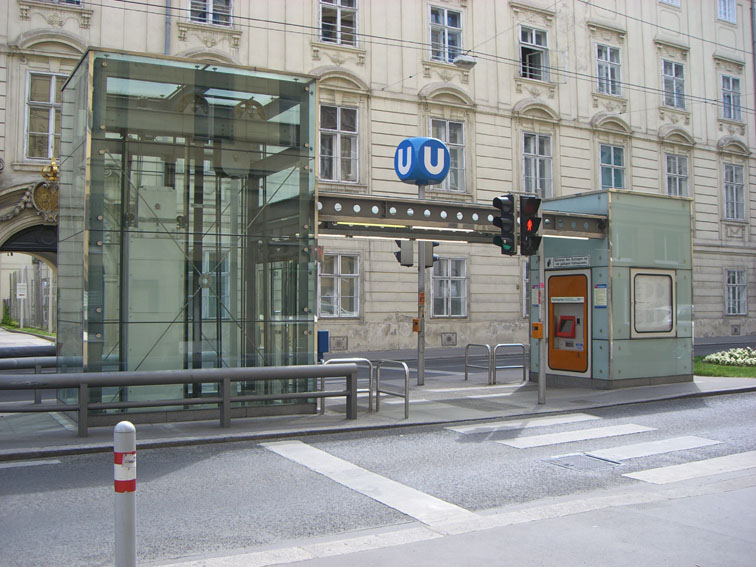 Lifthäuschen der U-Bahnstation Taubstummengasse, in Richtung Theresianum gesehen